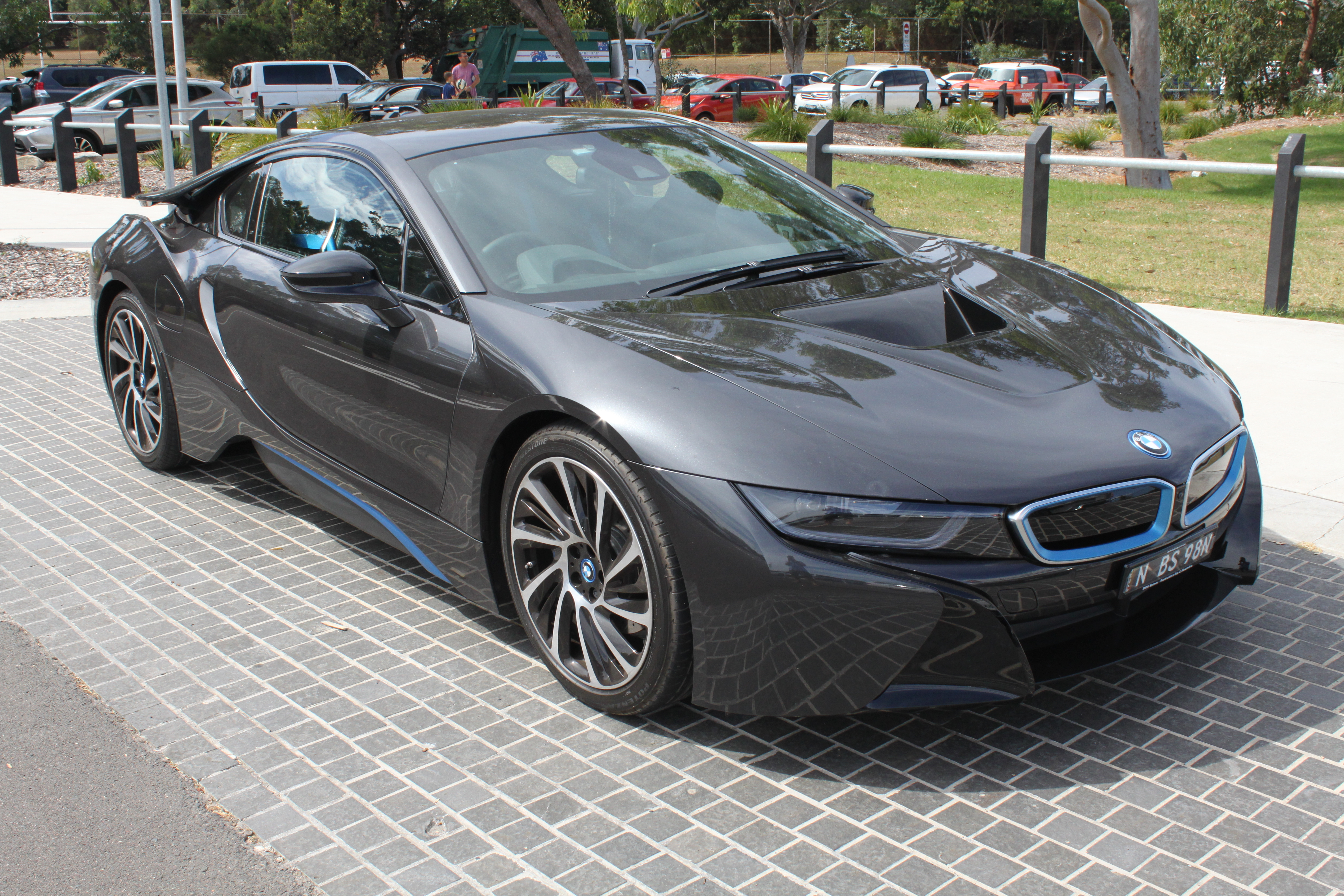 BMW i8